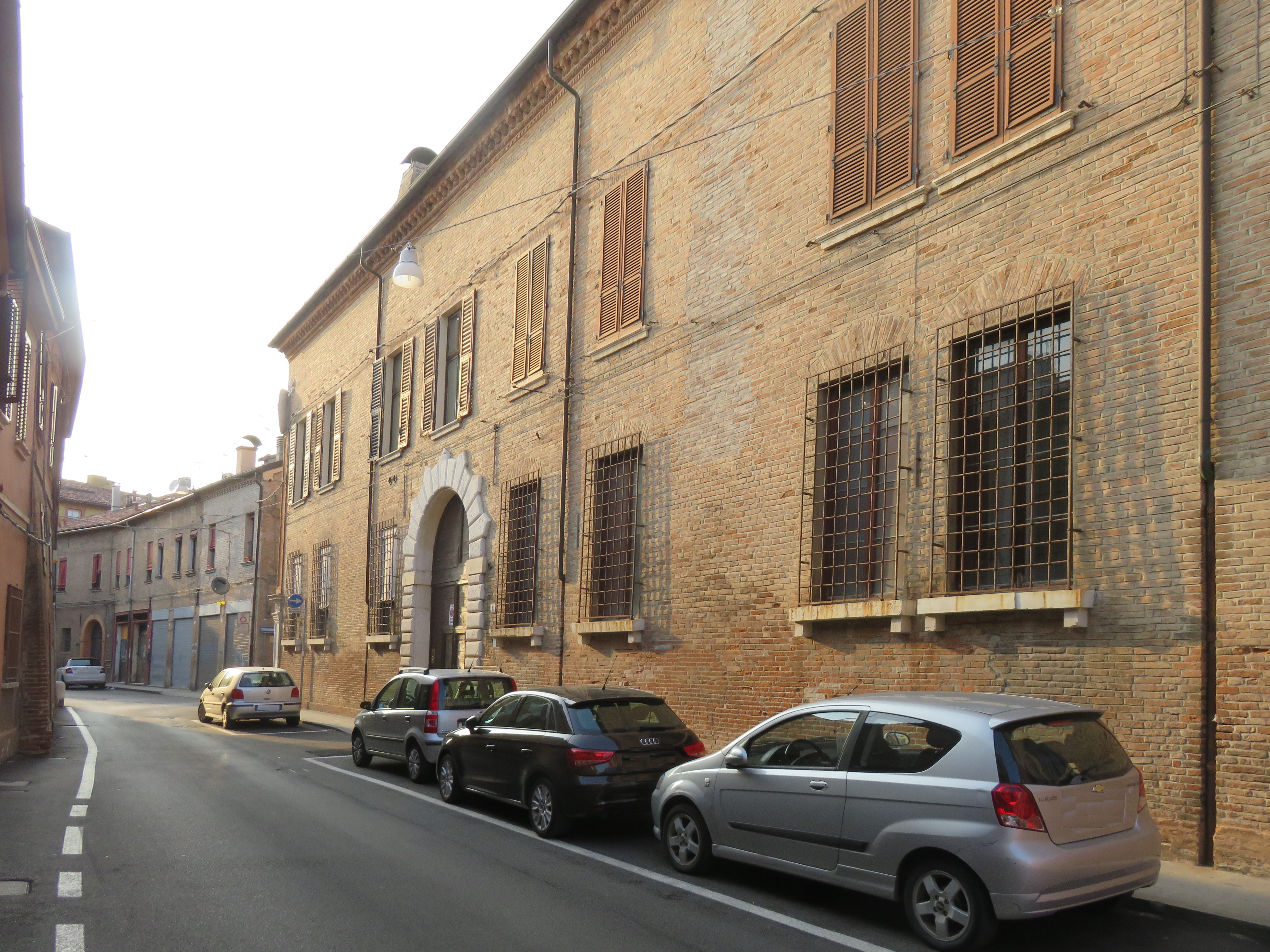 Antica via di Ferrara appartenente ai primi insediamenti urbani